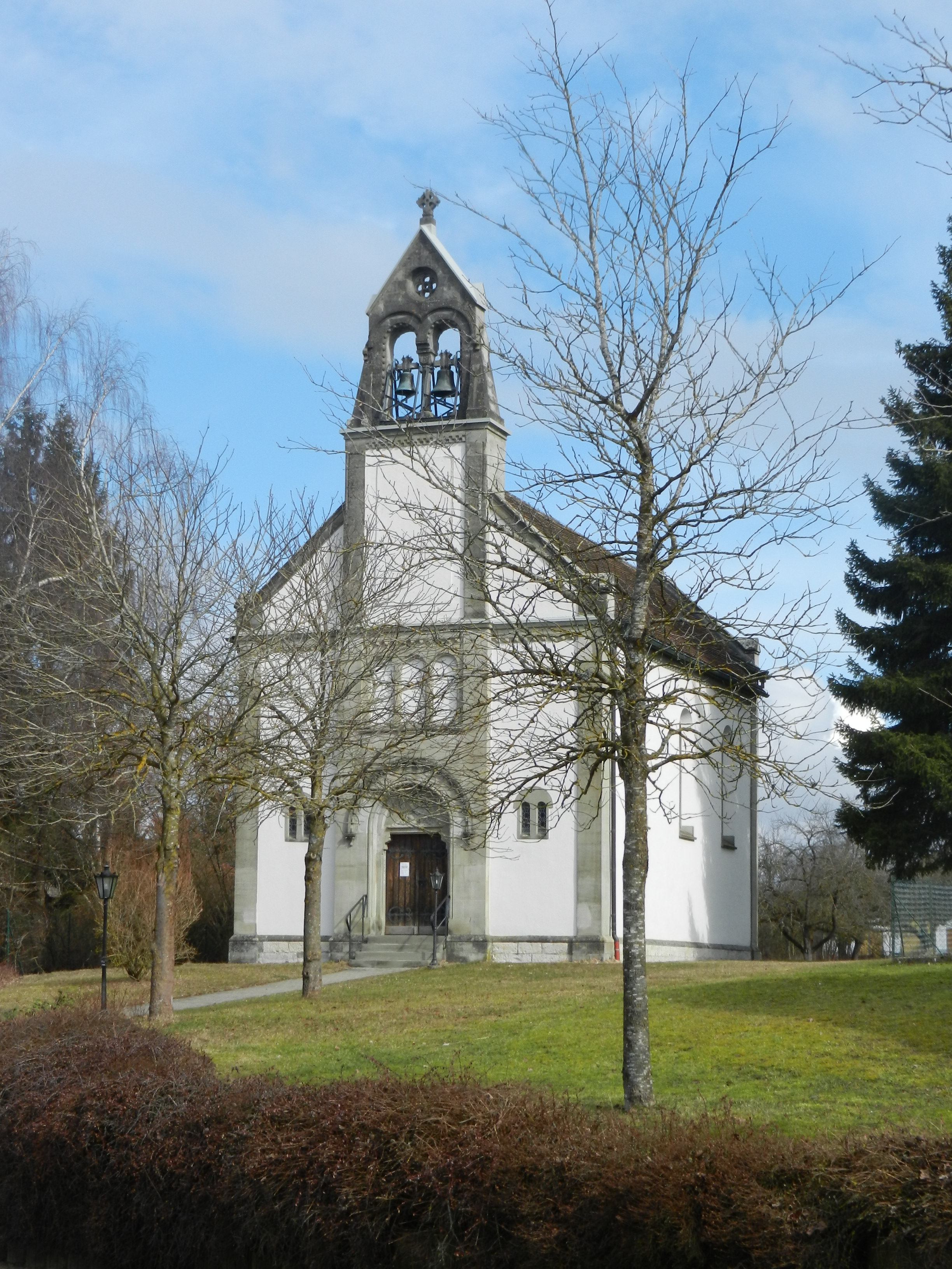 Kapelle Unterschwandorf, Neuhausen ob Eck